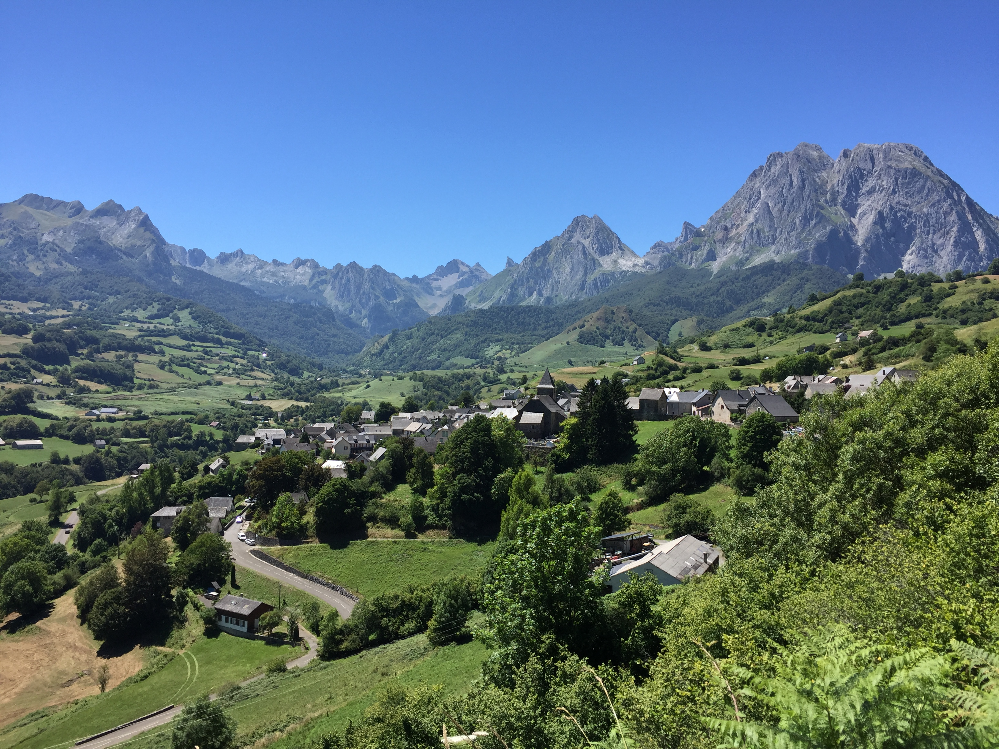 Le village de Lescun et le cirque du même nom.